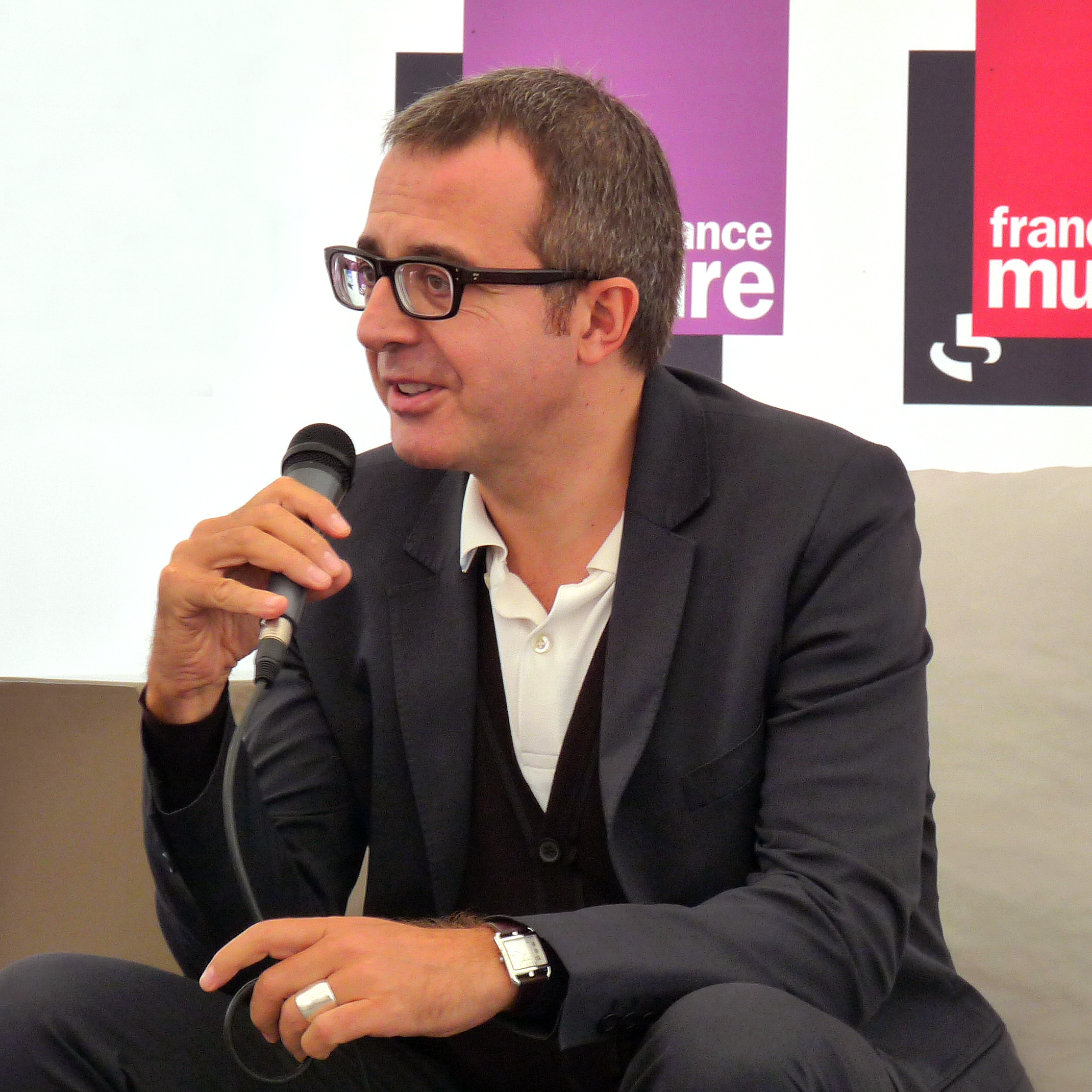 Entretien avec Charles Dantzig dans le cadre du "Livre sur la Place", Nancy, septembre 2011